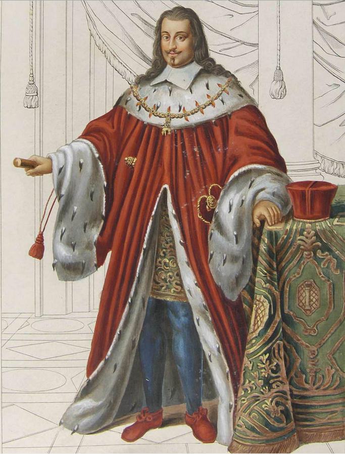 Marcantonio IV Colonna